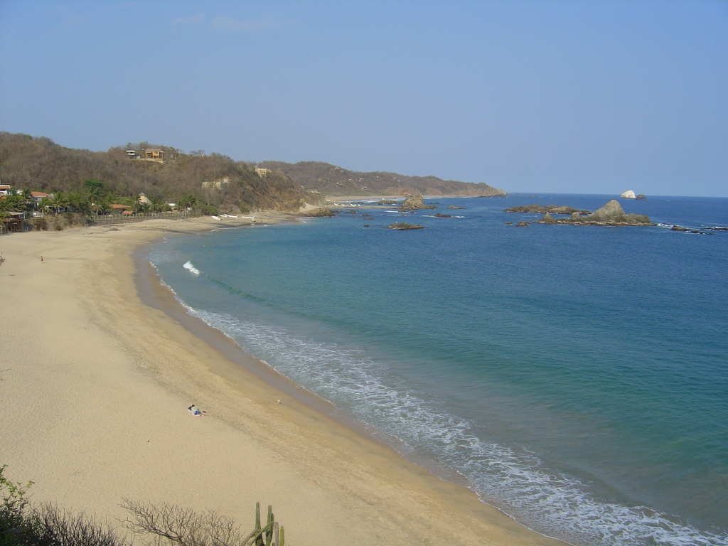 Photo prise le 23/04/2006 à 17h30 (heure locale) à Mazunté (Oaxaca, Mexique) par Itomi Bhaa.